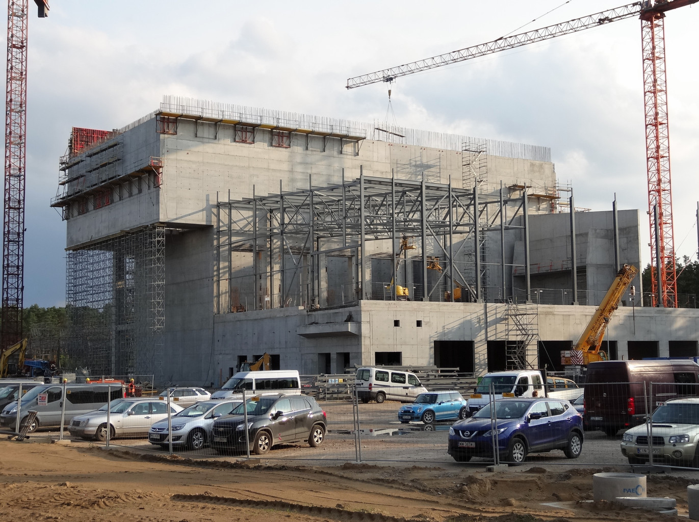 Spalarnia odpadów komunalnych (w budowie) dla Bydgosko-Toruńskiego Obszaru Funkcjonalnego na terenie Bydgoskiego Parku Przemysłowo-Technologicznego